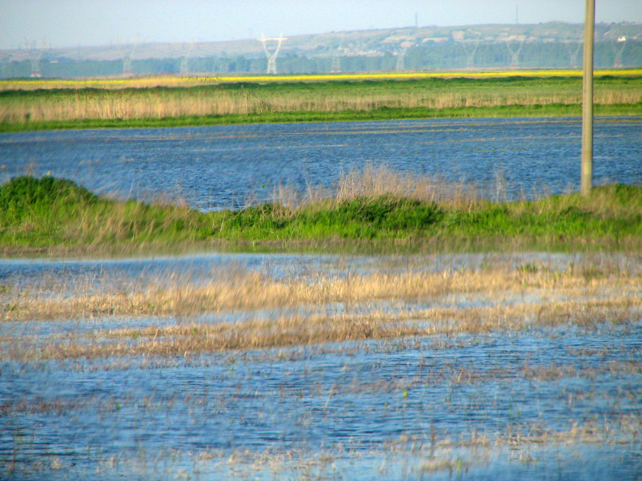 Balta Ialomiţei, România, flooded